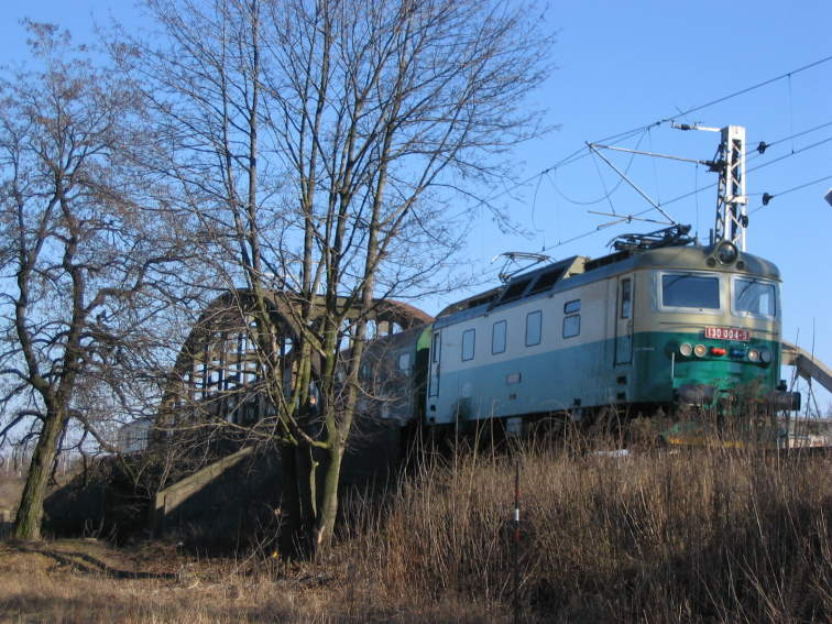 Lokomotiva řady 130, oblast Hradec Králové - most přes Labe